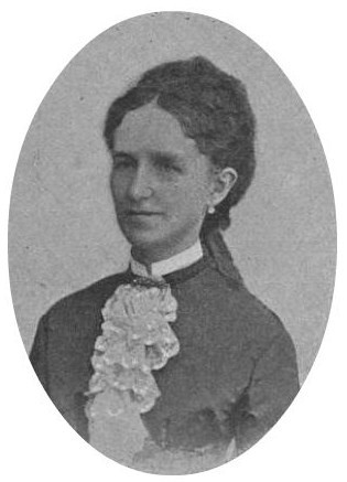 Графиня Мария Николаевна Ламздорф